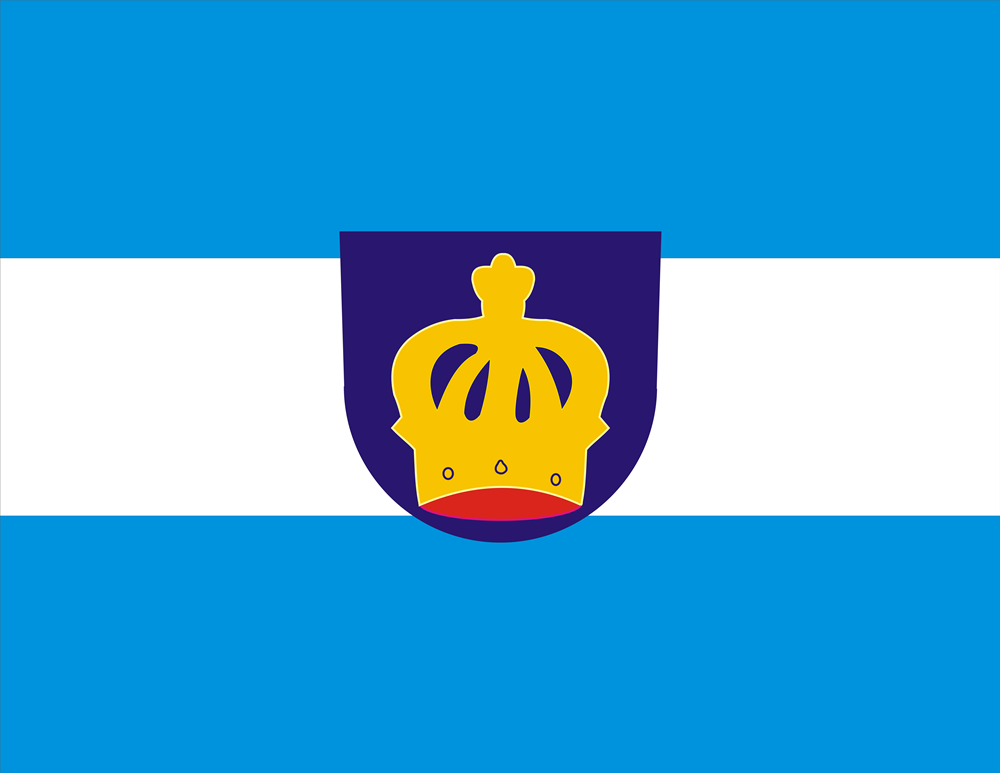 Bandeira de Governador Mangabeira